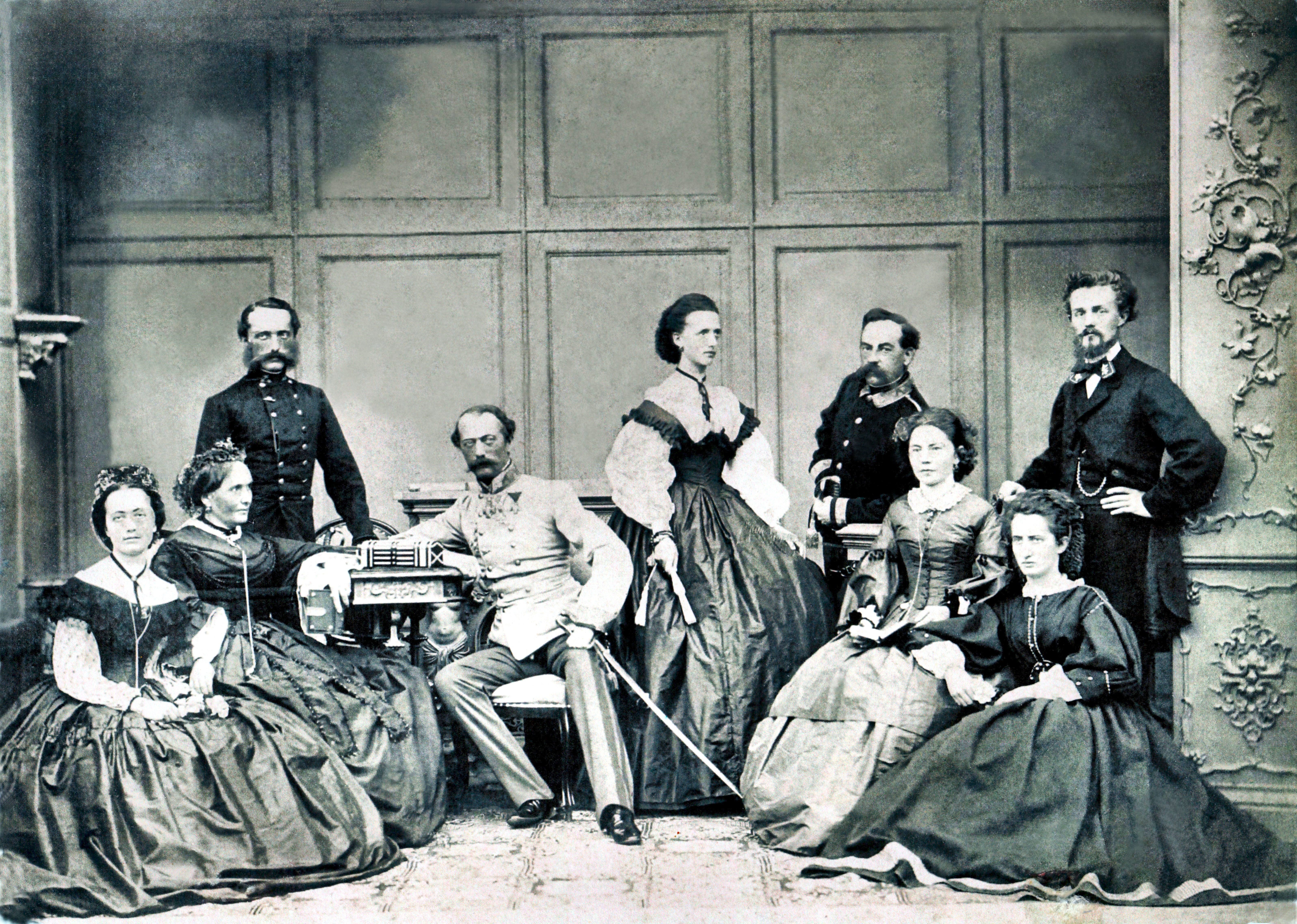 Li.:Rudolf LvW, später FML, mit Gattin Emma v. Josch; Mitte 1: Eveline, geb. Schreher mit Wilhelm LvW; Mitte 2: Malwine LvW mit Gattem GM/CH Fhr. Konstantin v. Buol; re: Eugen LvW mit Gattin Emma Giseke; re. u.: Berta LvW, 1876 verh. mit Fhr. Karl Putz v. Rolsberg